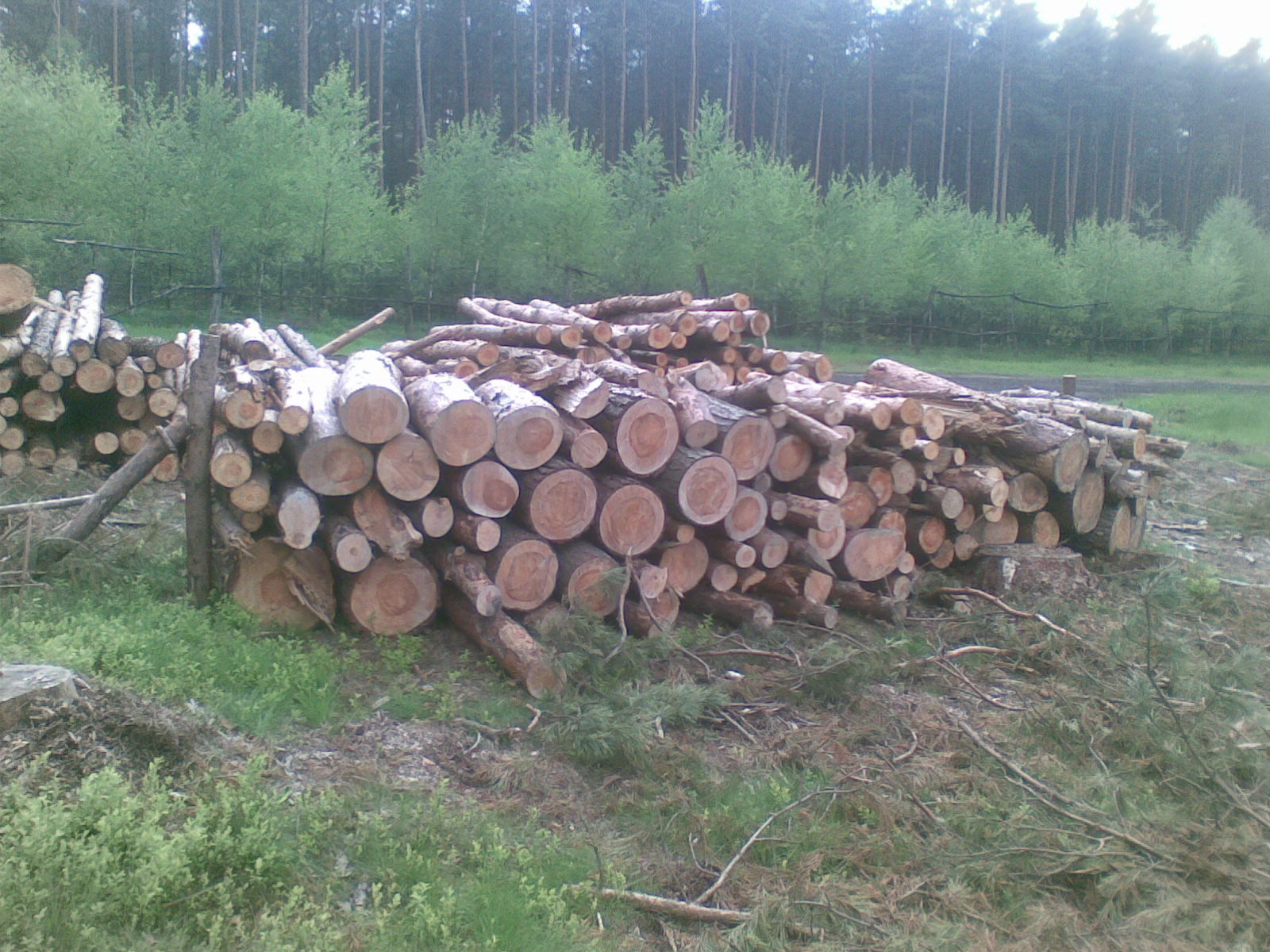 Metry w lesie